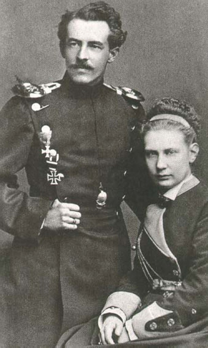 Grã-duquesa Vera Constantinovna da Rússia com o seu marido